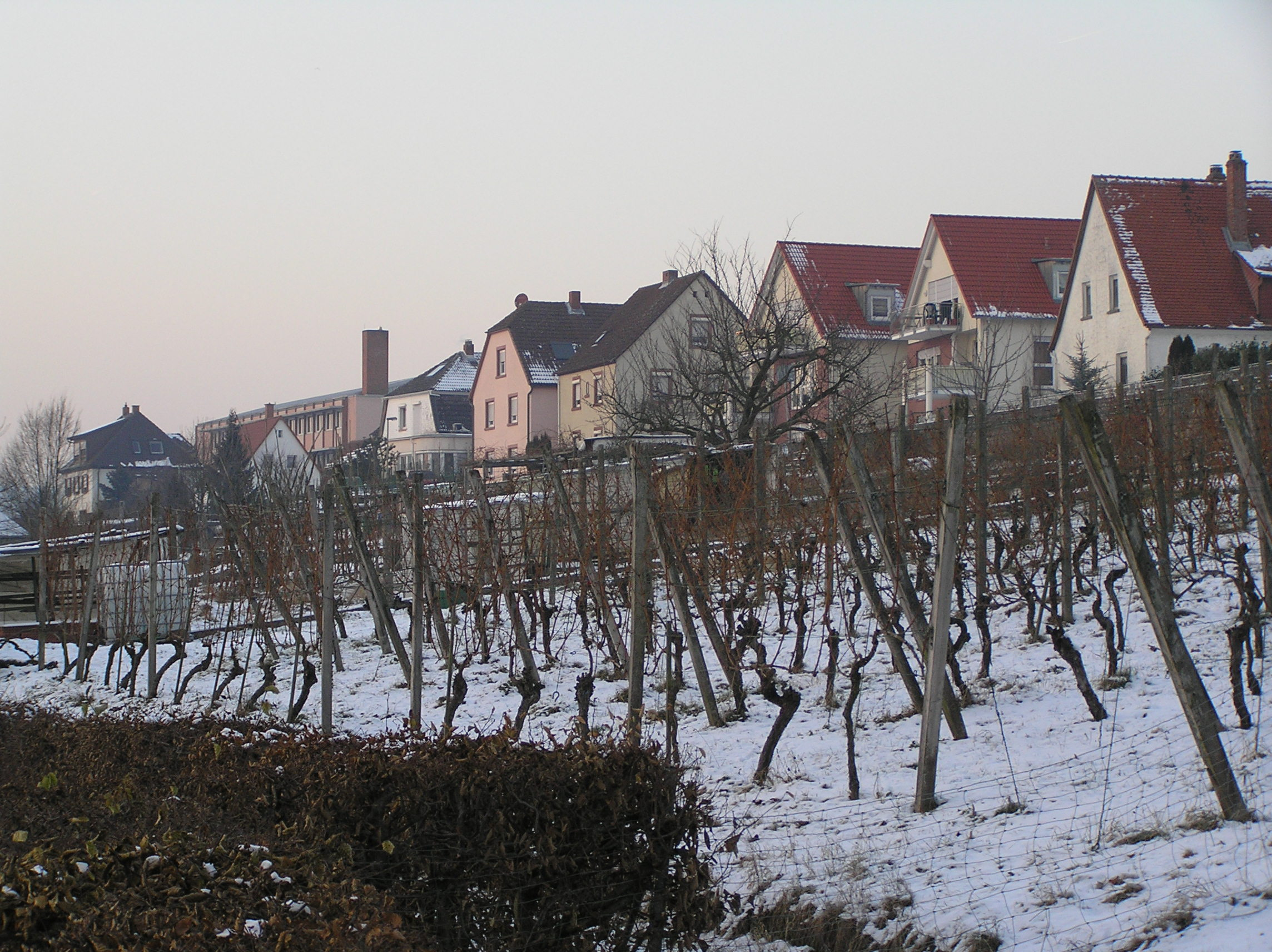 Weinberge in Erlenbach am Main, unterhalb der Altdorfstraße am Mainufer